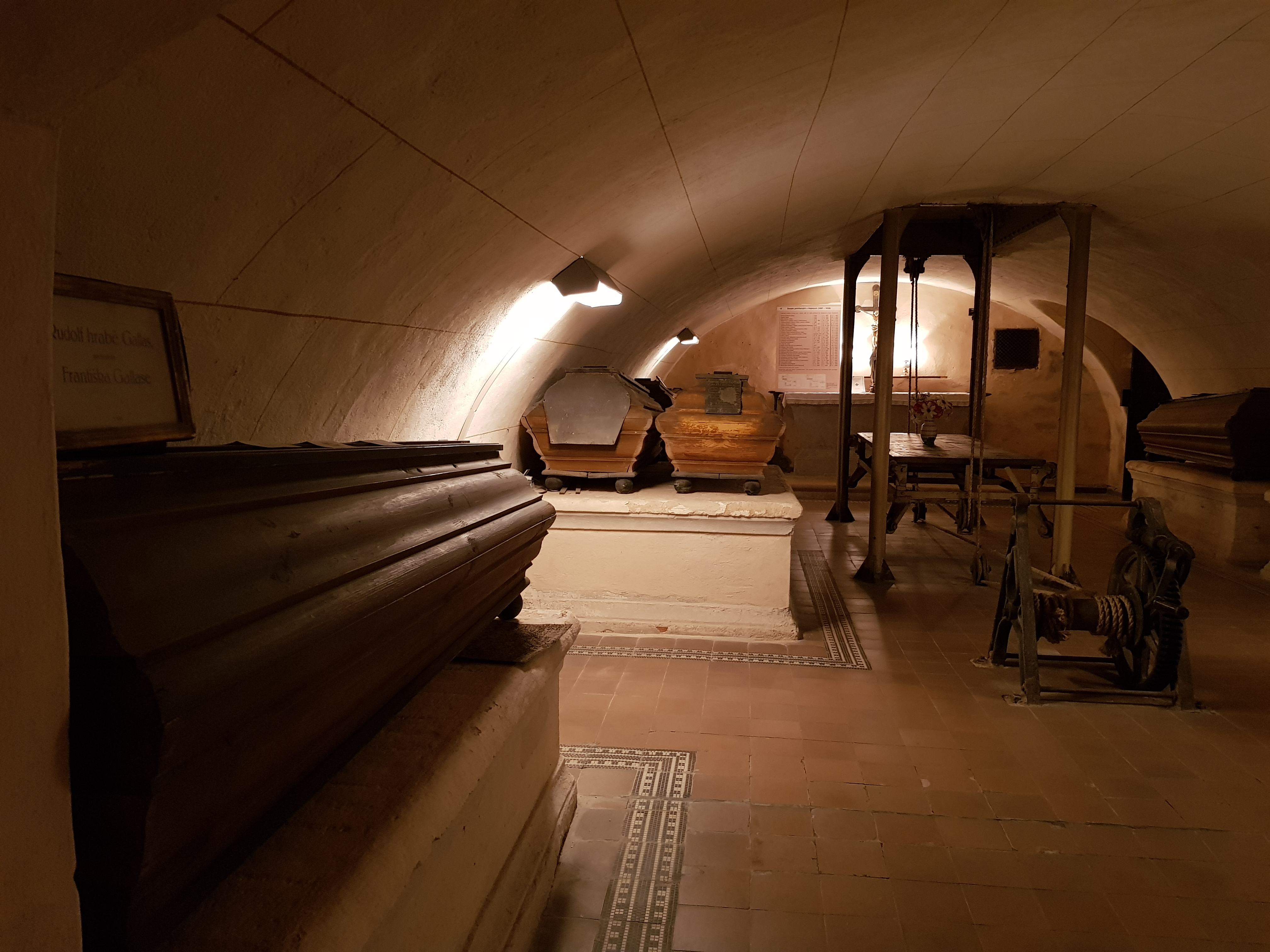 Hrobka Gallasů a Clam-Gallasů v Hejnicích